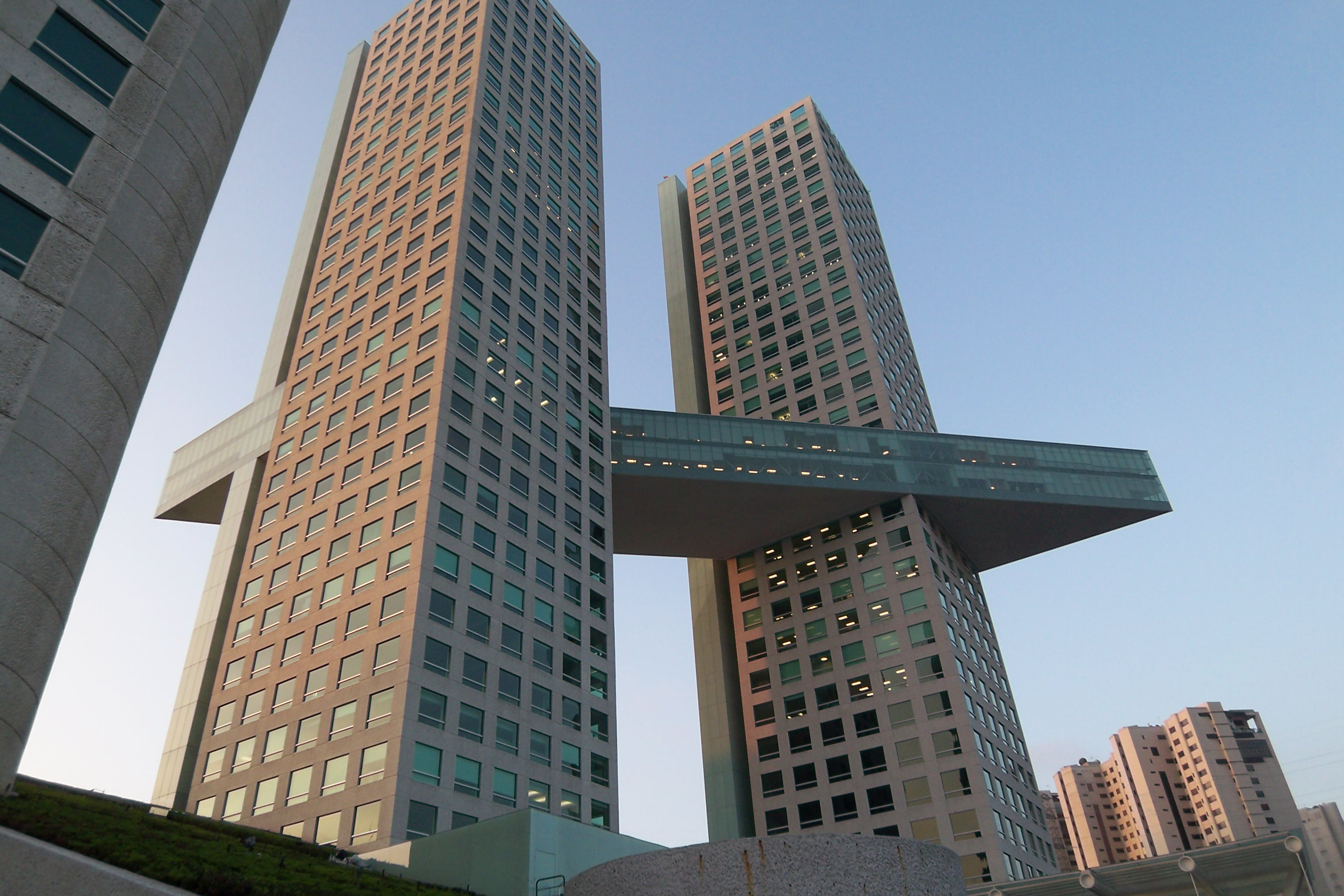 Torre Arcos Bosques 2, desde abajo.